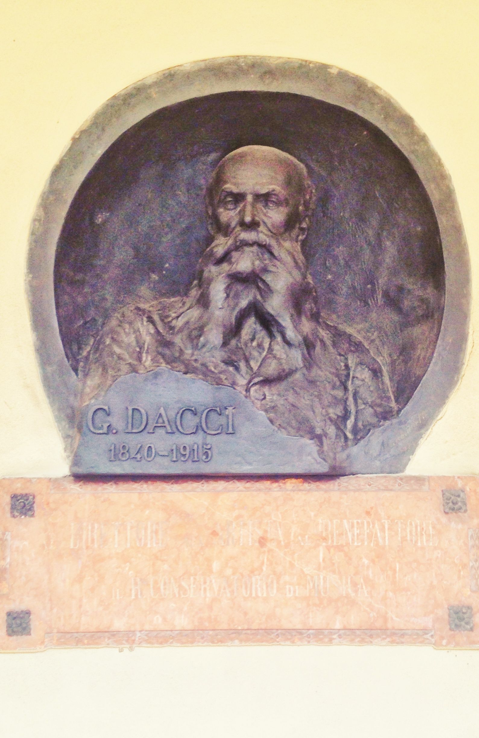 Giusto Dacci